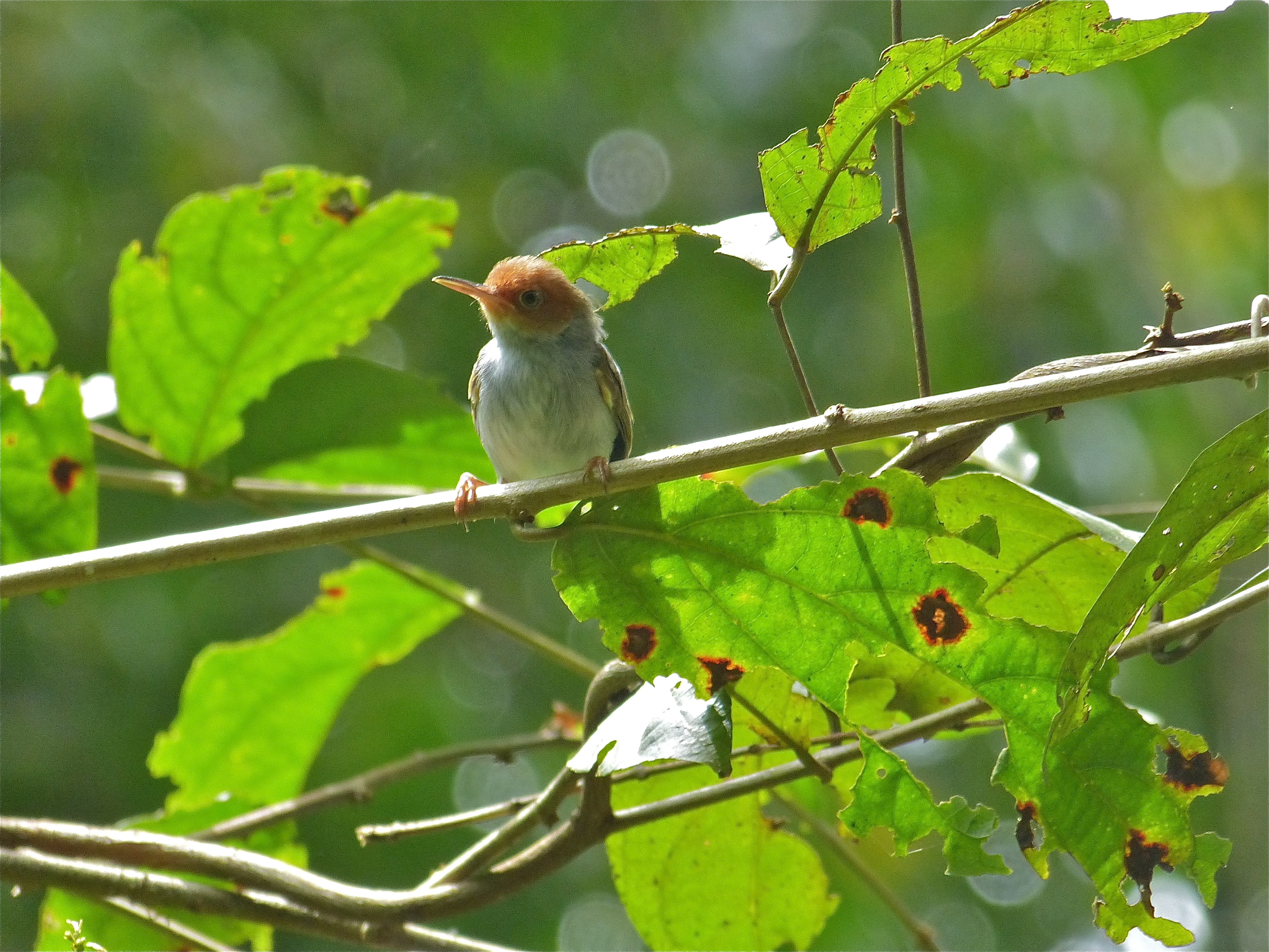 Uncle Tan's Jungle Camp, Kinabatangan River, Sabah, MALAYSIA